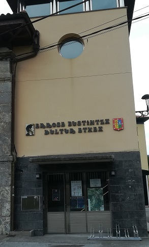 Errose Bustinza Casa de Cultura. Mañaria (Bizkaia)